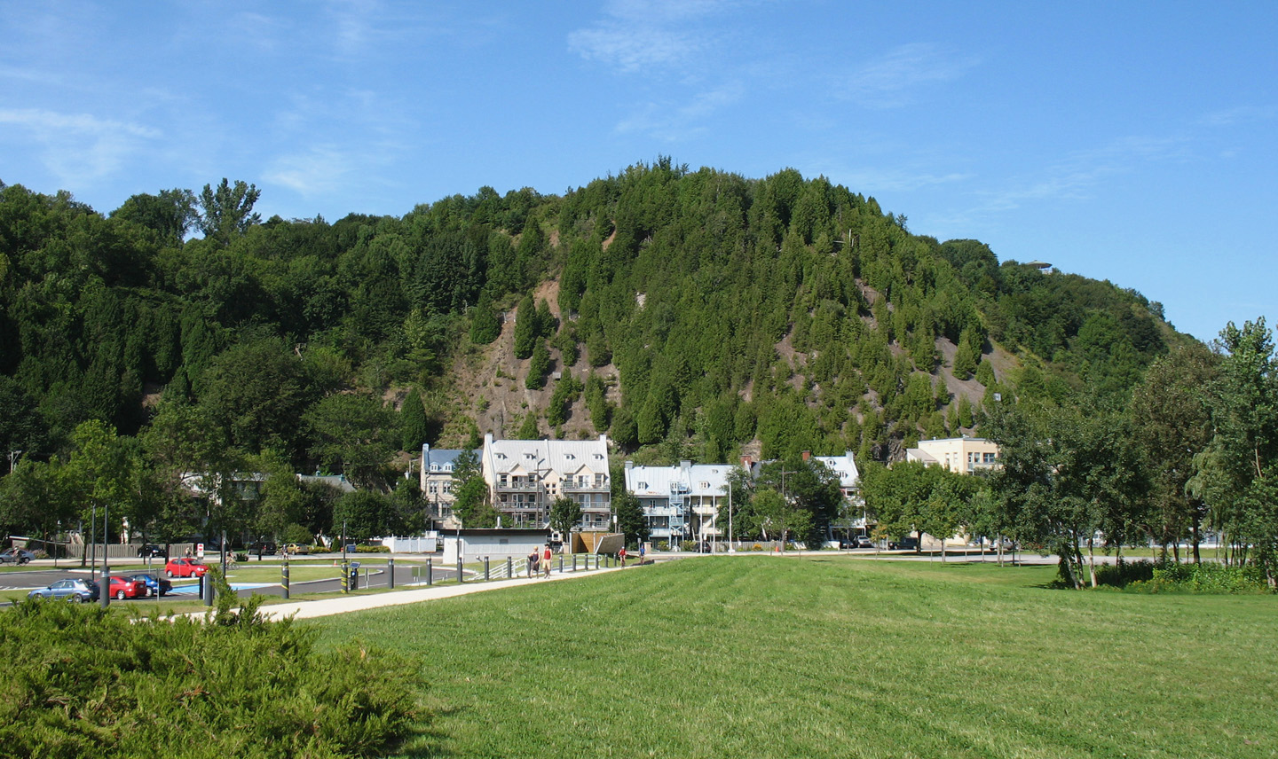 Le quartier Cap-Blanc et le Cap Diamant, boulevard Champlain, Ville de Québec, arrondissement de La Cité, quartier Vieux-Québec—Cap-Blanc—Colline parlementaire, Québec, Canada